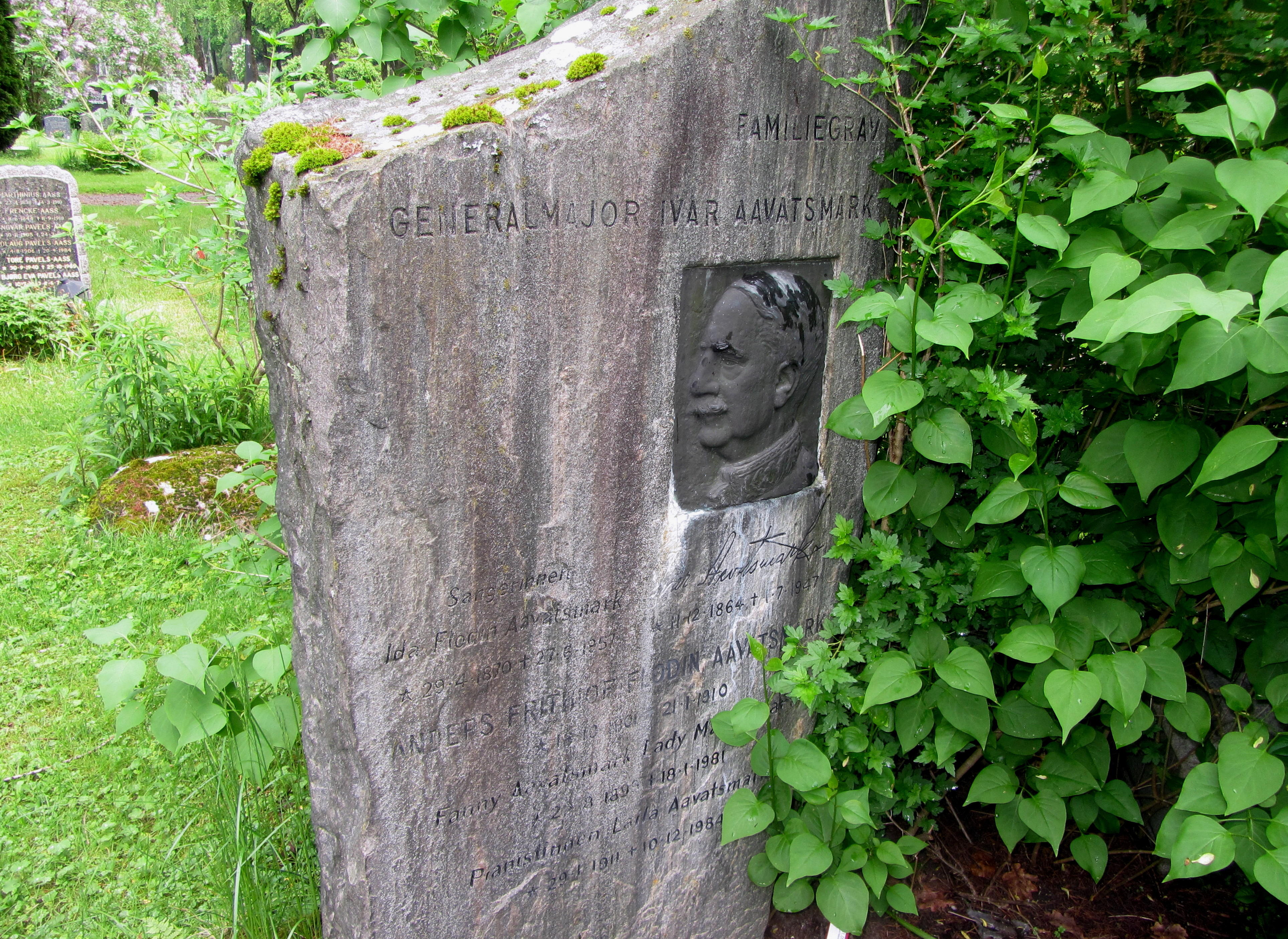 Gravminne på Vestre gravlund i Oslo for generalmajor og statsråd (V) Ivar Aavatsmark (1864–1947).